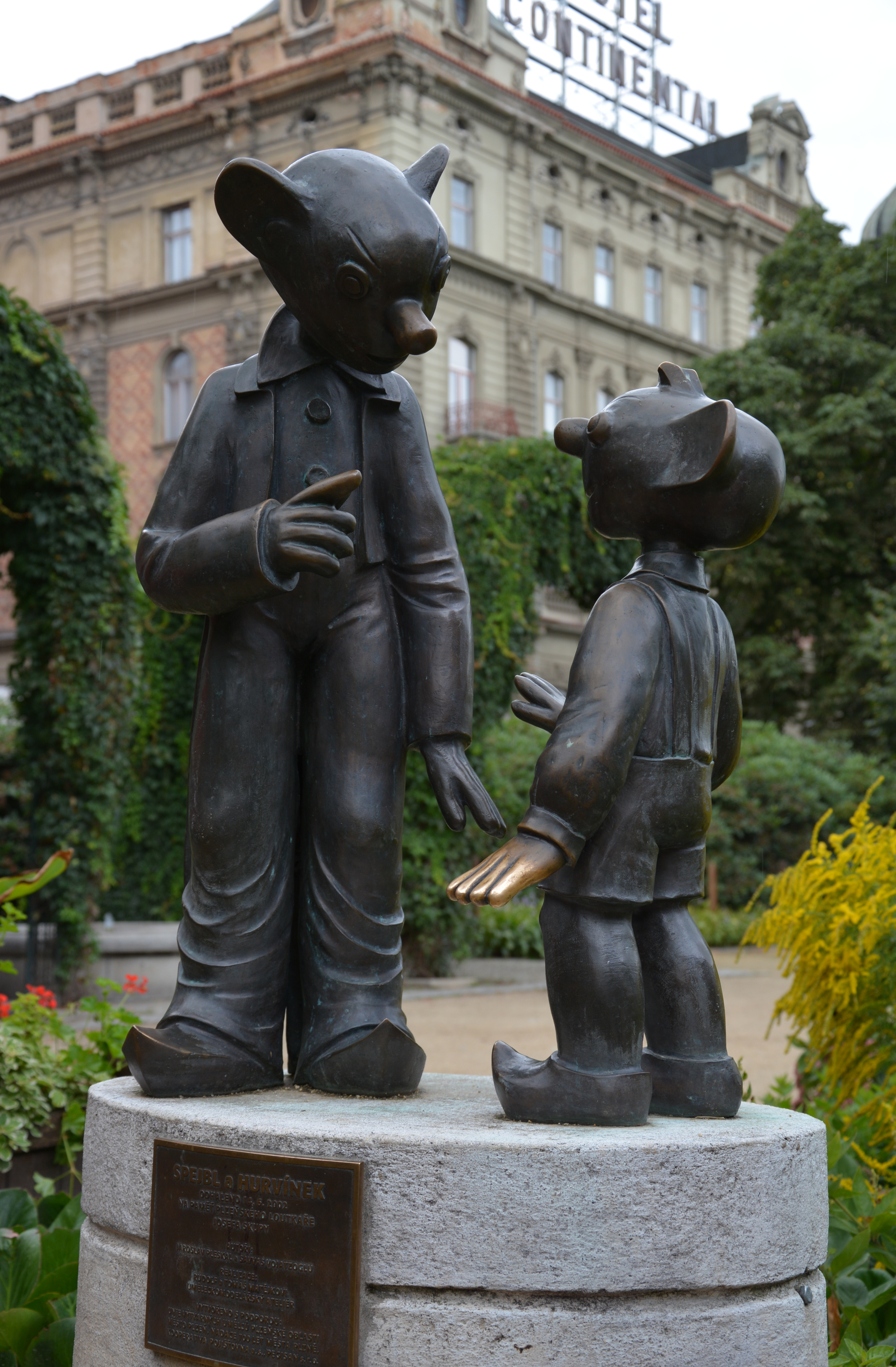 Plastik von Spejbl und Hurvínek in Pilsen